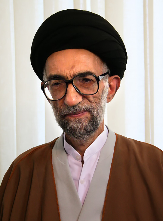 Mujtaba Musavi Lari